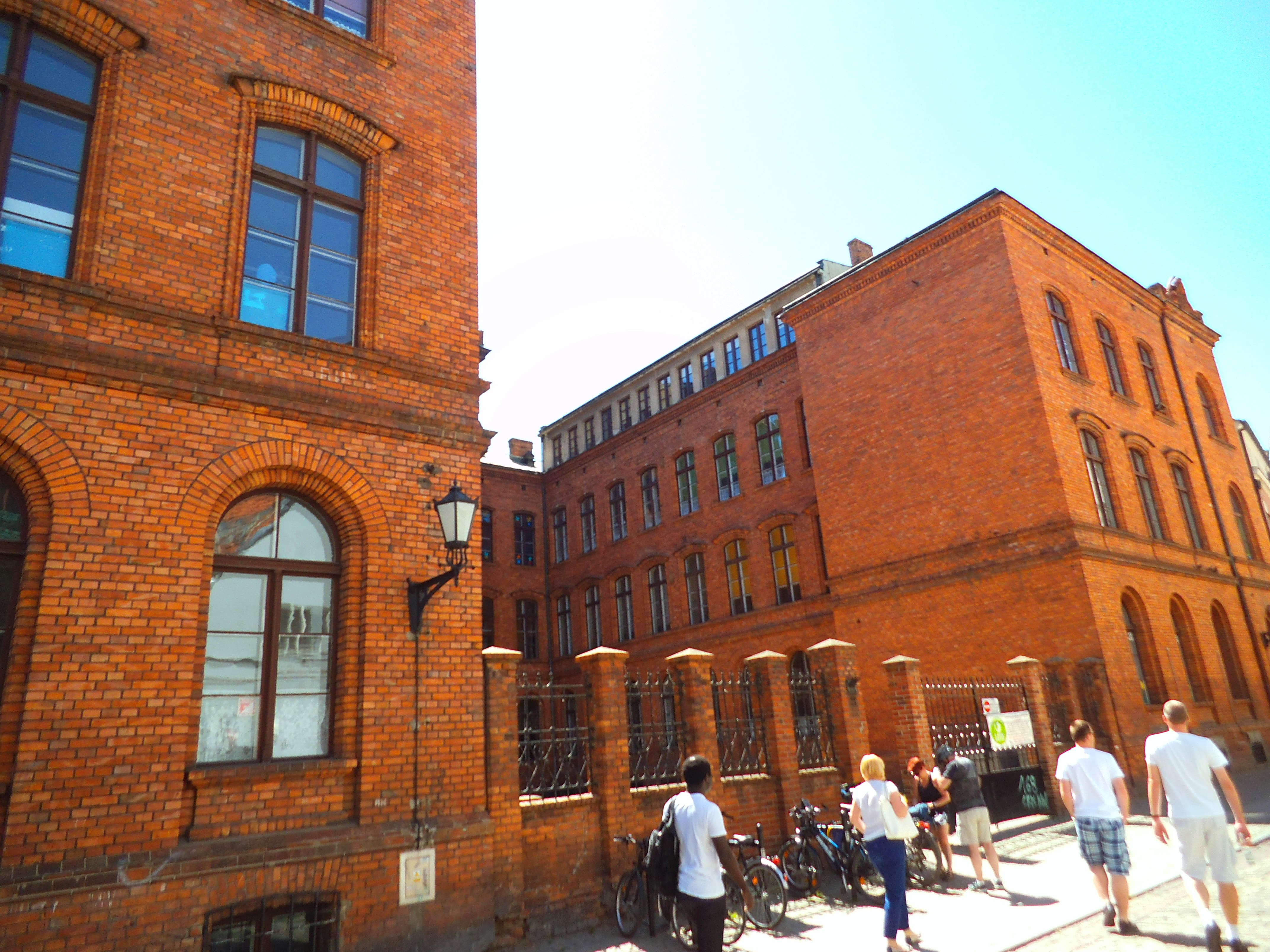 Budynek Szkoły Podstawowej Nr 1 w Toruniu